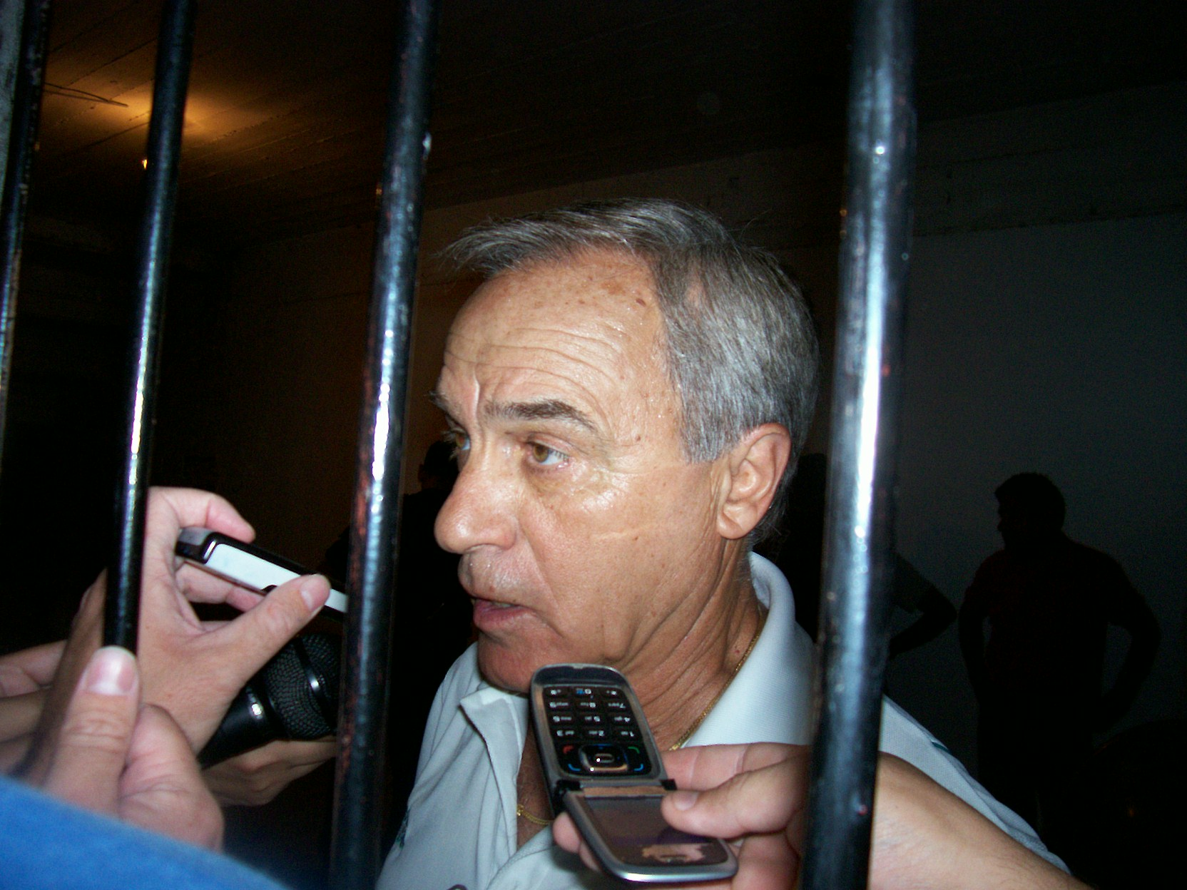 Fotografía de Roberto Marcos Saporiti, por entonces entrenador de Talleres de Córdoba, luego del partido ante Central Córdoba de Santiago del Estero